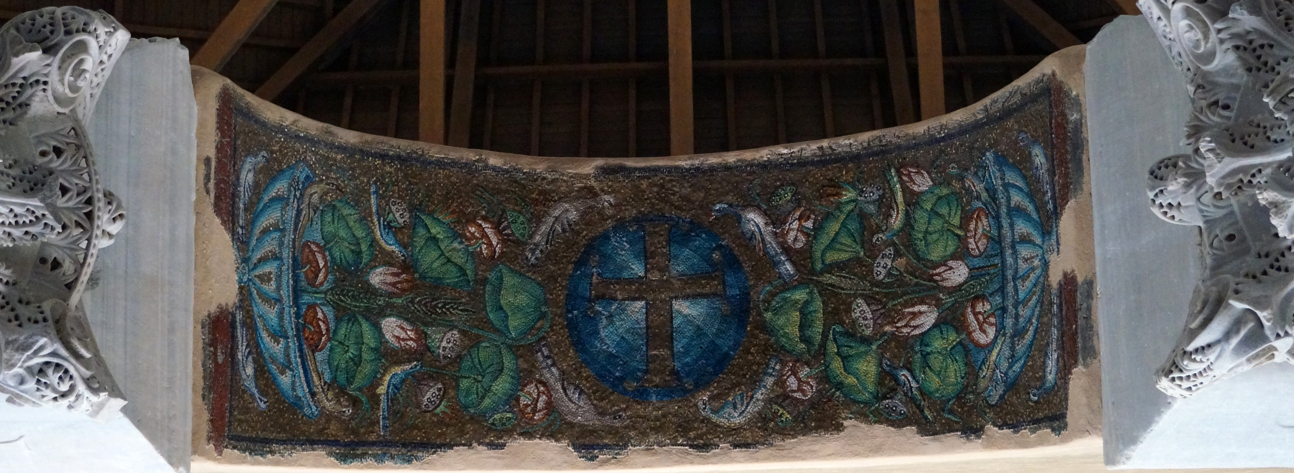 vue de l'église Acheiropoietos .